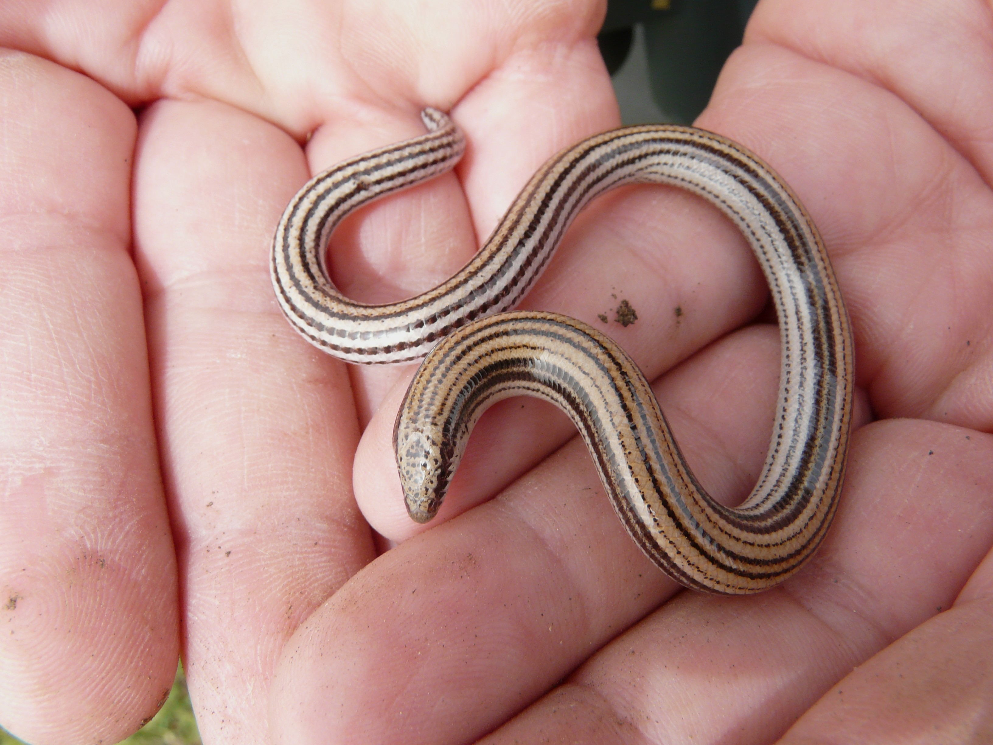 Skink, Ophiomorus latastii, Jordan